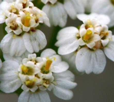 Achillea millefolium (particolare dell'infiorescenza)